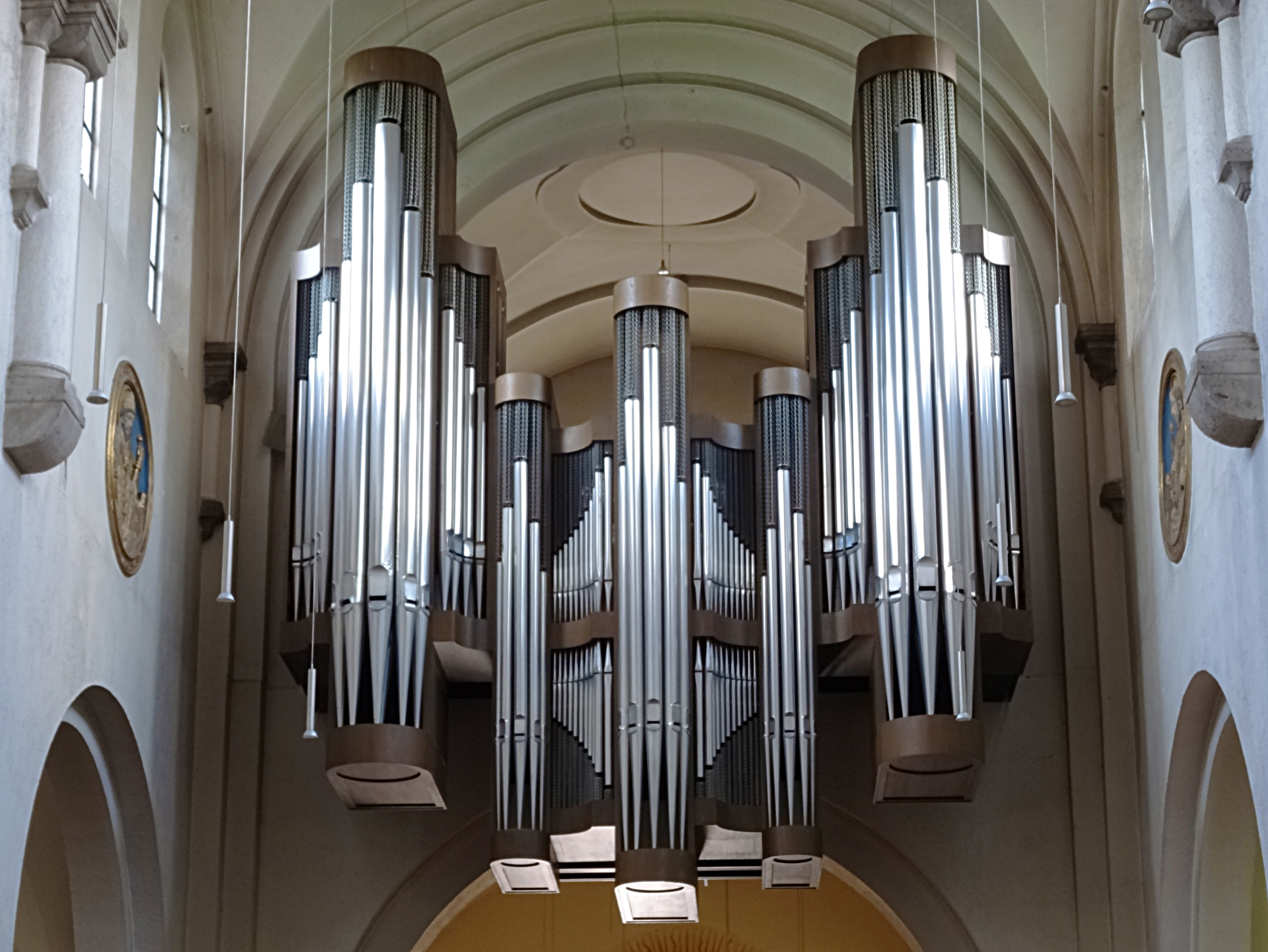 Pfarrkirche St. Anna im Lehel, Klais-Orgel (1980)